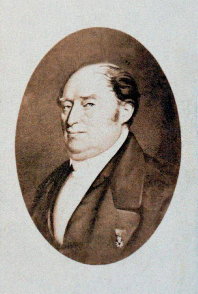 Photographie de l'historien André Jung (1860)